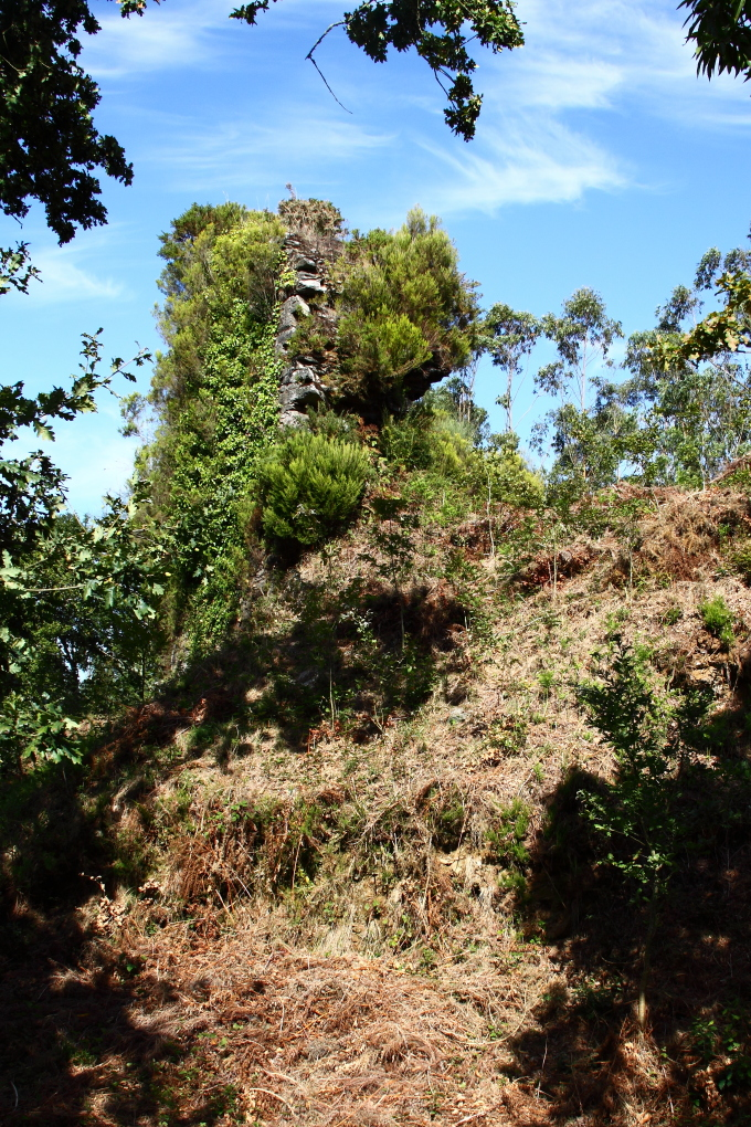 Ruinas del Castillo de Mesia